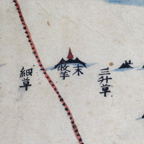 ▼『大東輿地図』から、京畿道喬桐郡唜島・細草・三升草の部分を抜粋。